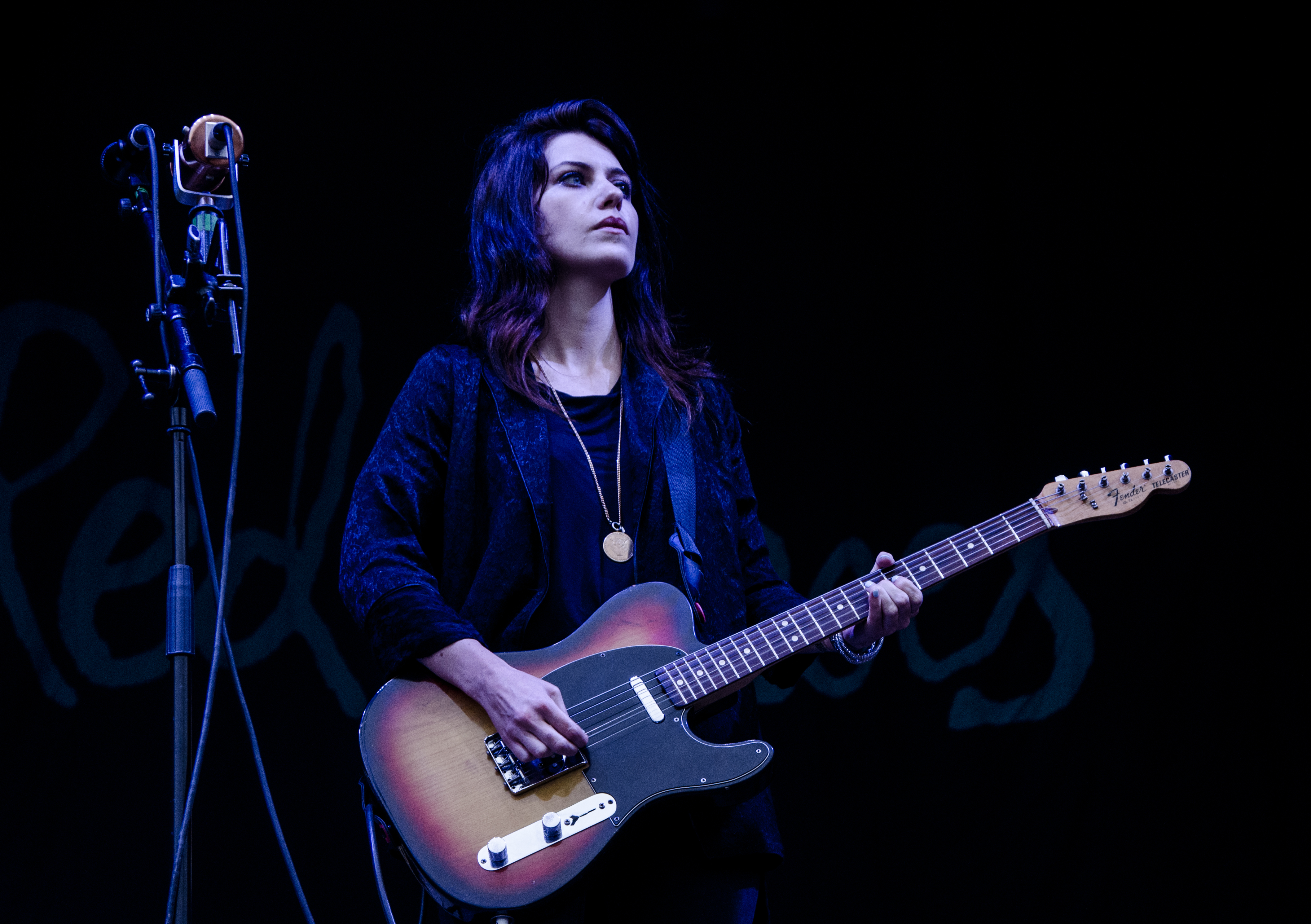 Laura-Mary Carter, von der Band Blood Red Shoes auf dem Kosmonaut Festival 2014 in Chemnitz Oberrabenstein.